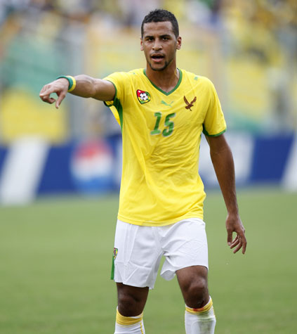 Photo prise le 20.06.09 à Rabat au Maroc par mes soins lors du match opposant le Maroc au Togo.